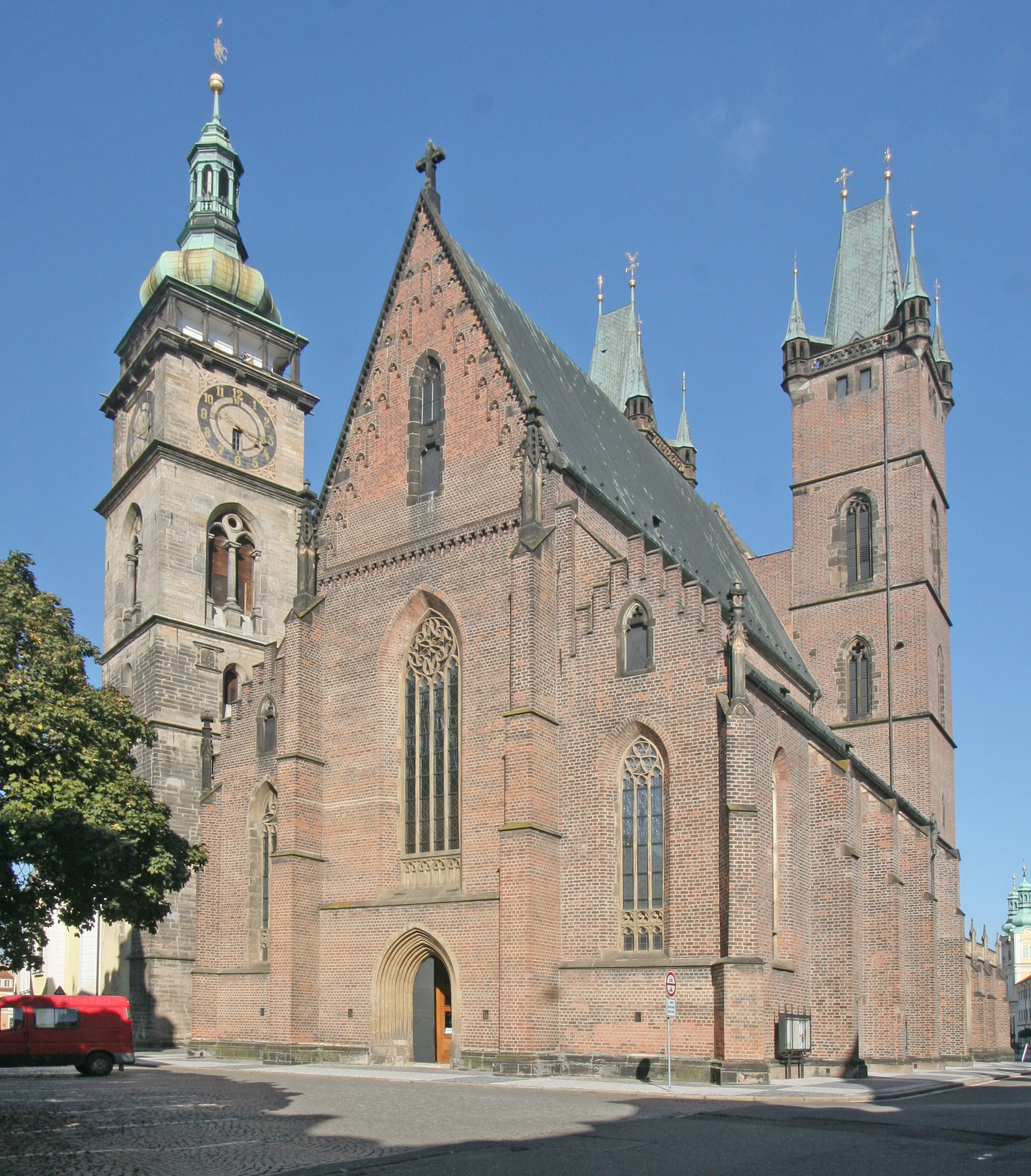 Kostel sv. Ducha, katedrální (Hradec Králové), Velké nám., Hradec Králové